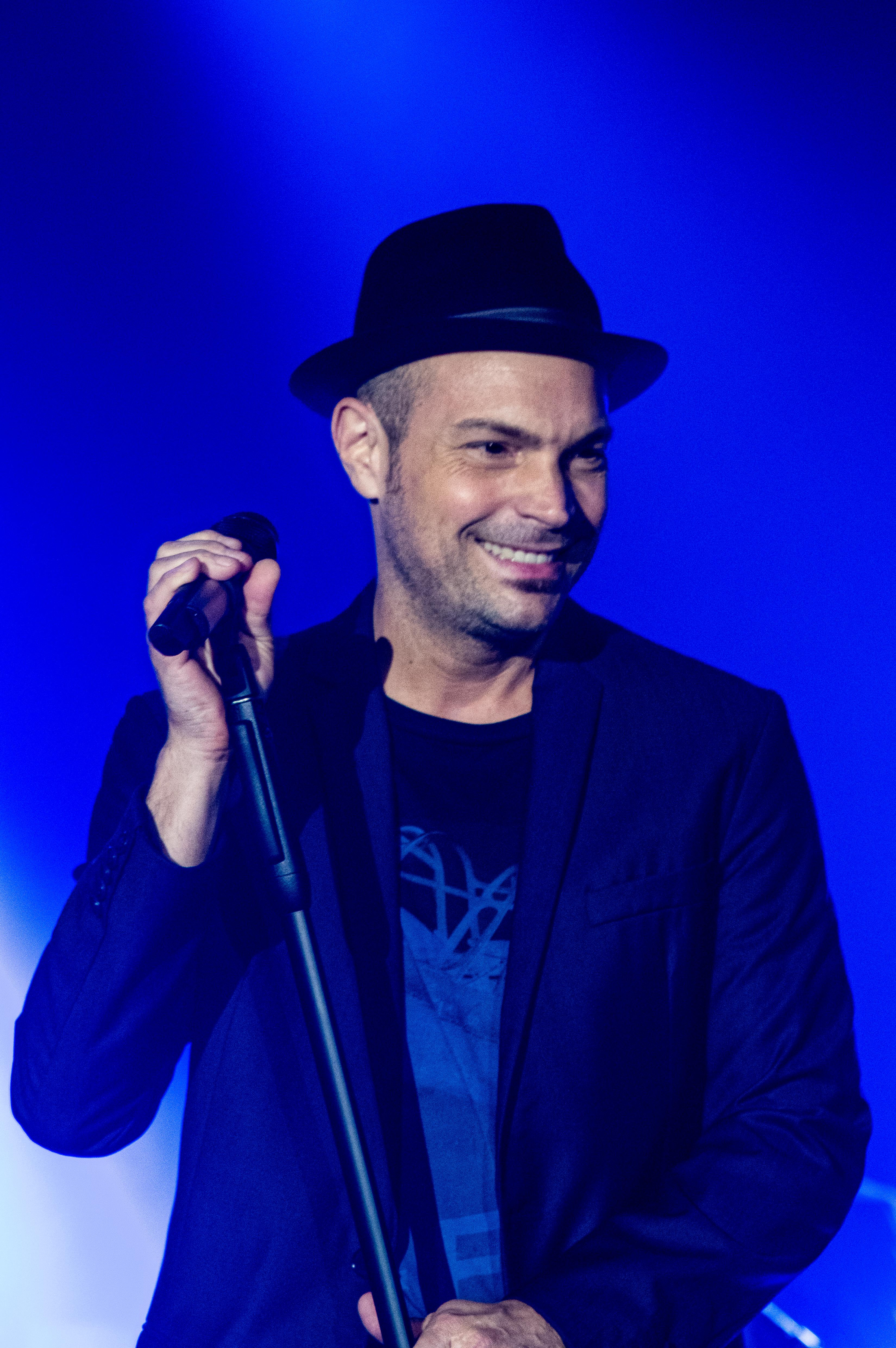 Das Zelt Musik Festival 2014 in Freiburg im Breisgau (16.07.2014 - 03. 08.2014) 22.07.2014 Roger Cicero & Band